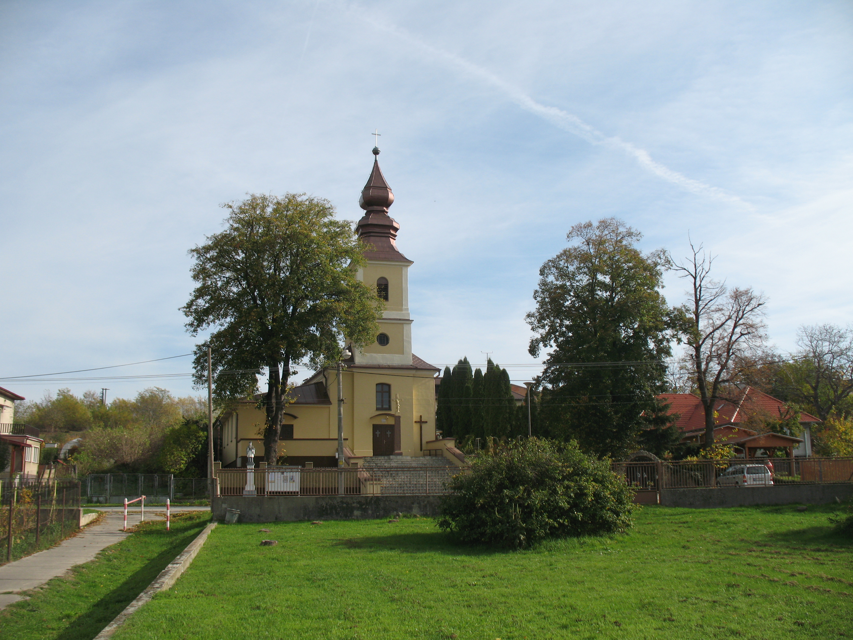 Nagylapás